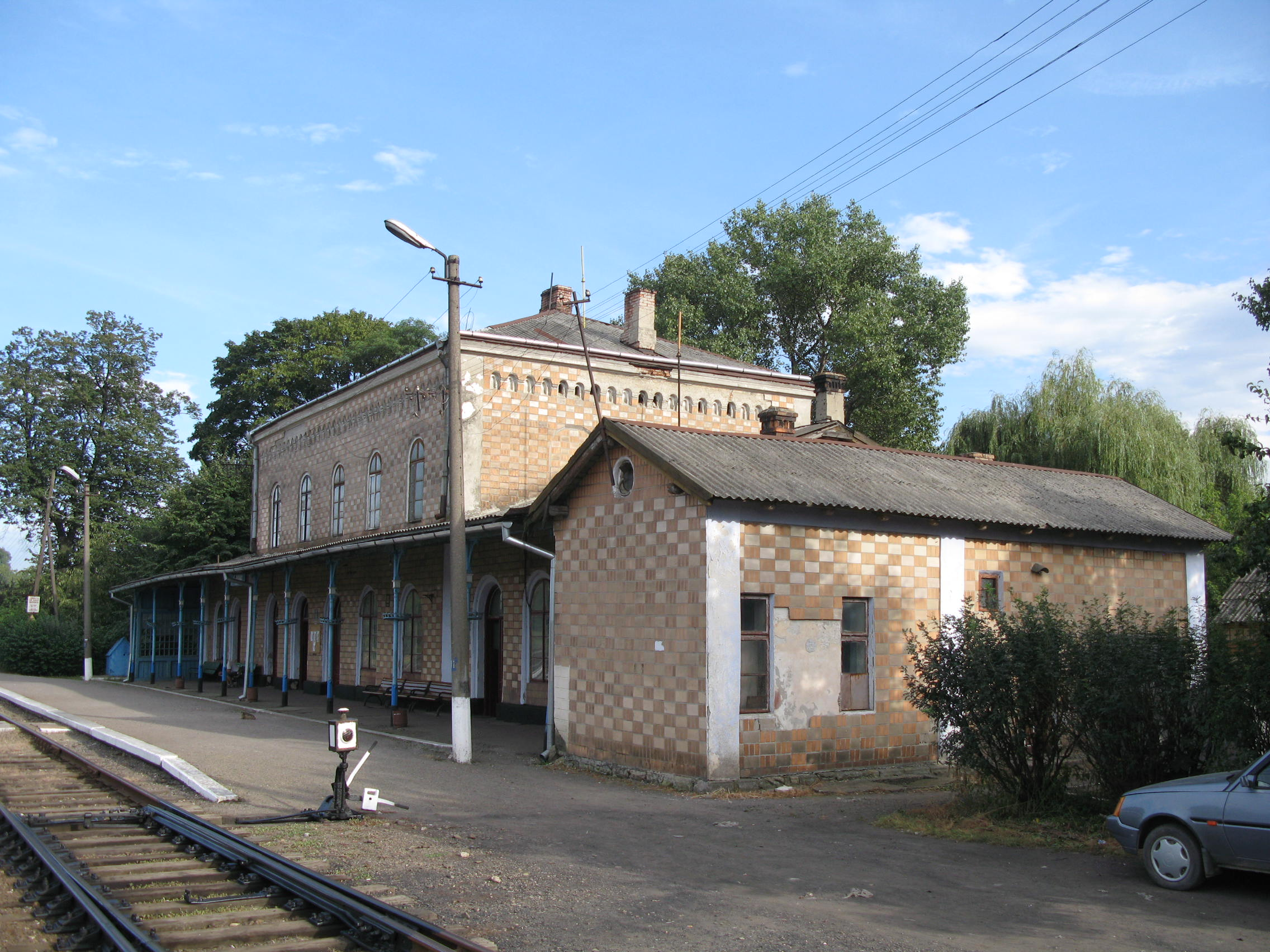 Станція Лужани